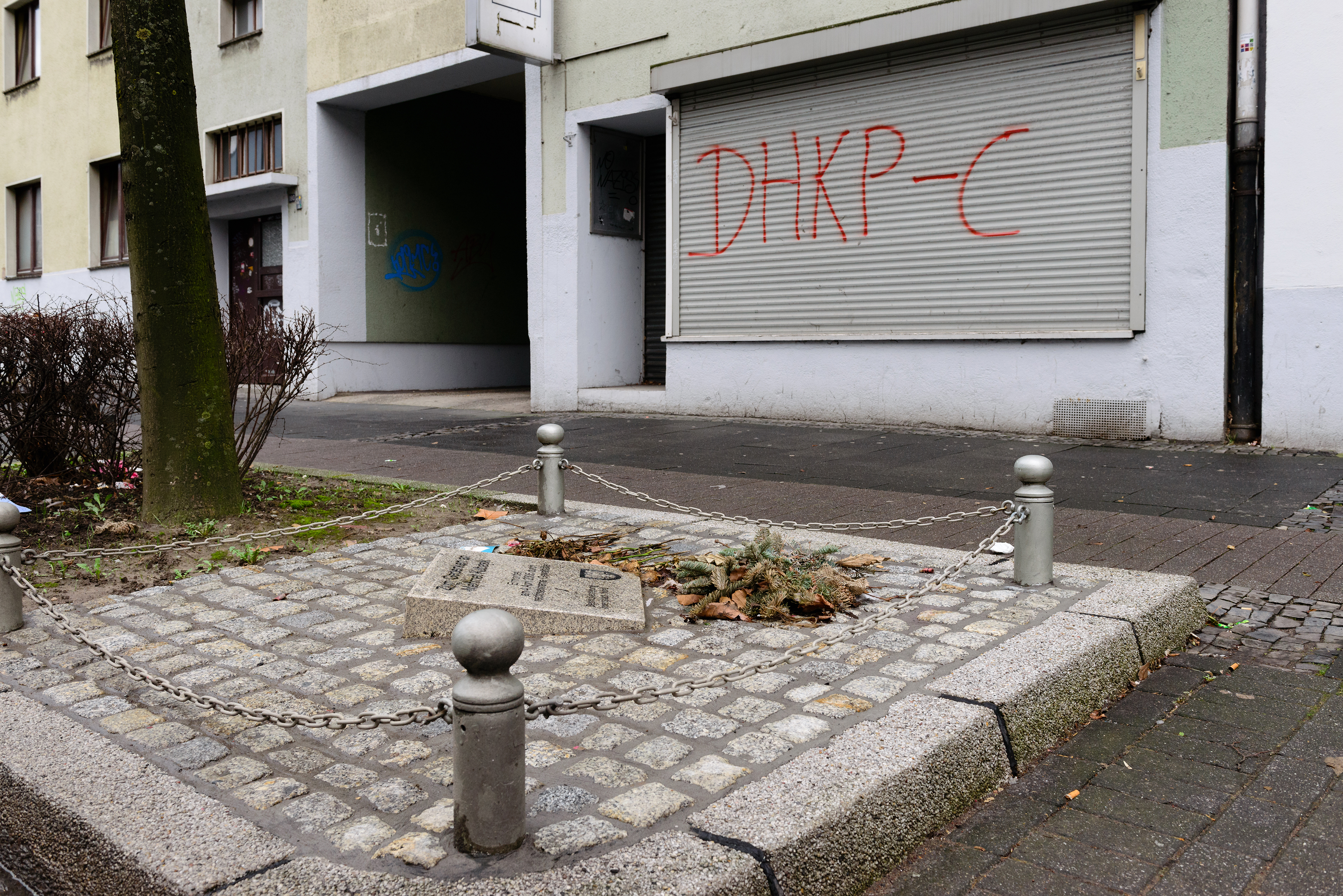 Am 4. April 2006 wurde Mehmet Kubasik von Rechtsextremisten in seinem Kiosk in der Mallinckrodtstraße 190 in Dortmund ermordet. Eine Gedenktafel vor dem ehemaligen Kiosk erinnert an das NSU-Mordopfer.